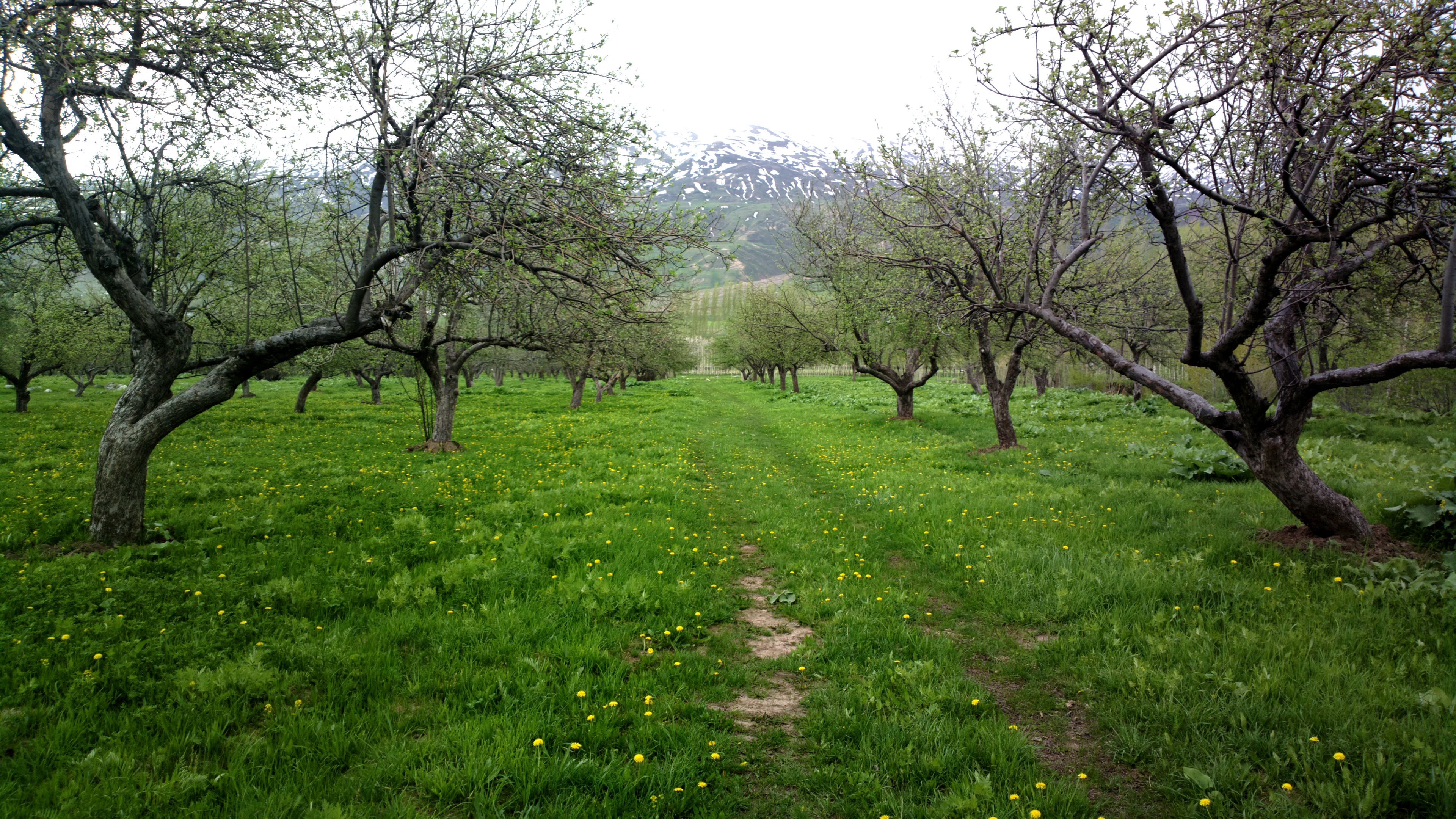 Тоҷикӣ: Боғи бисёрсолаи себ дар деҳаи Элоки ноҳияи Файзобод